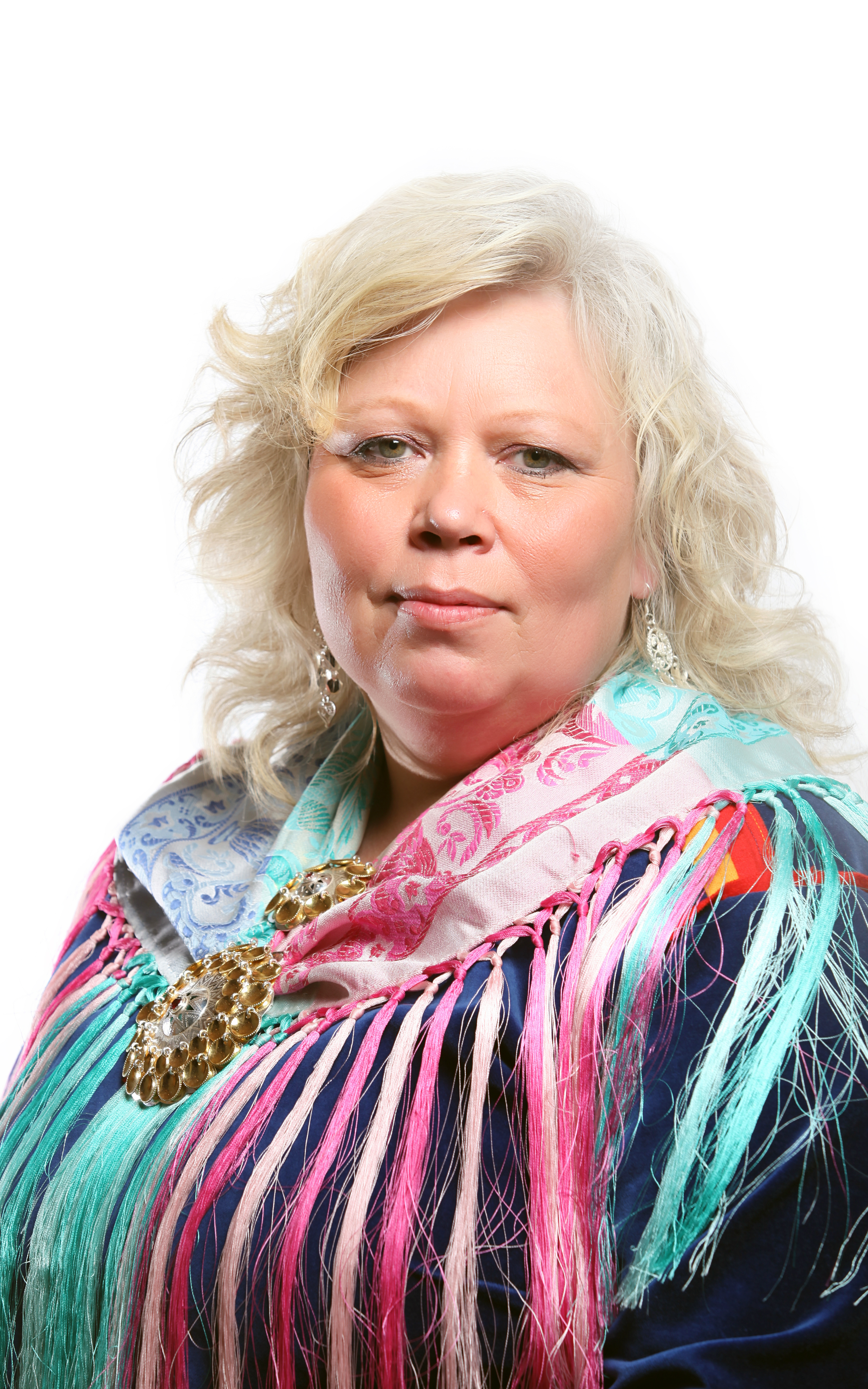 Medlem av plan- og finanskomitéen. Foto: Kenneth Hætta / Sametinget.